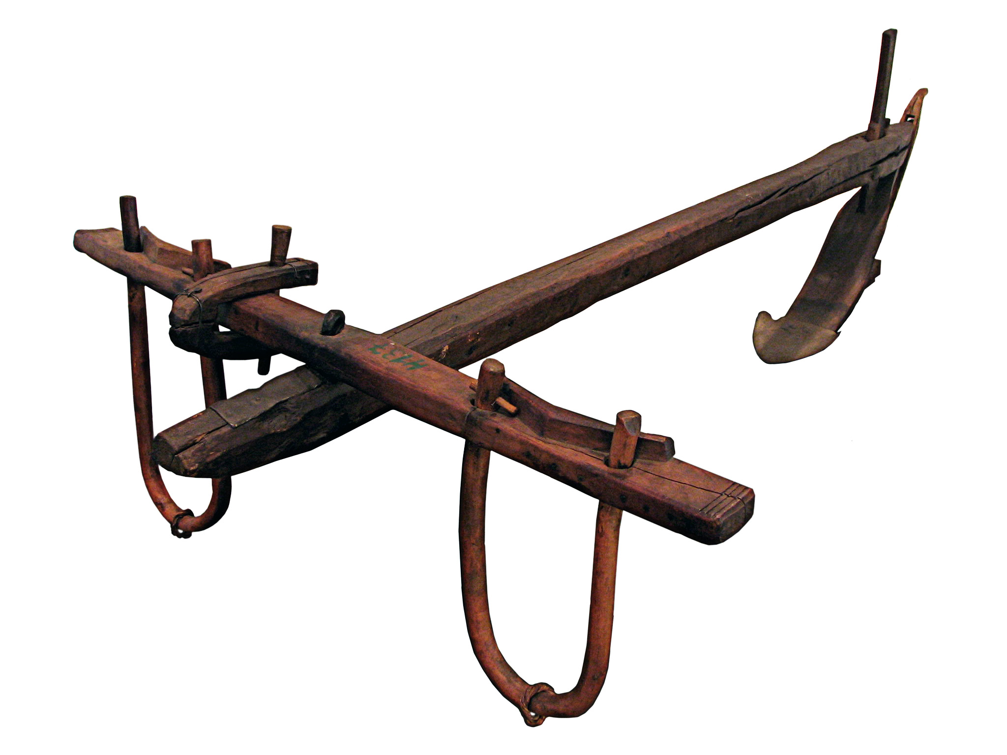 Оковани дрвени плуг са сточном вучом. Етнографски музеј Београд (фото Михаило Грбић)